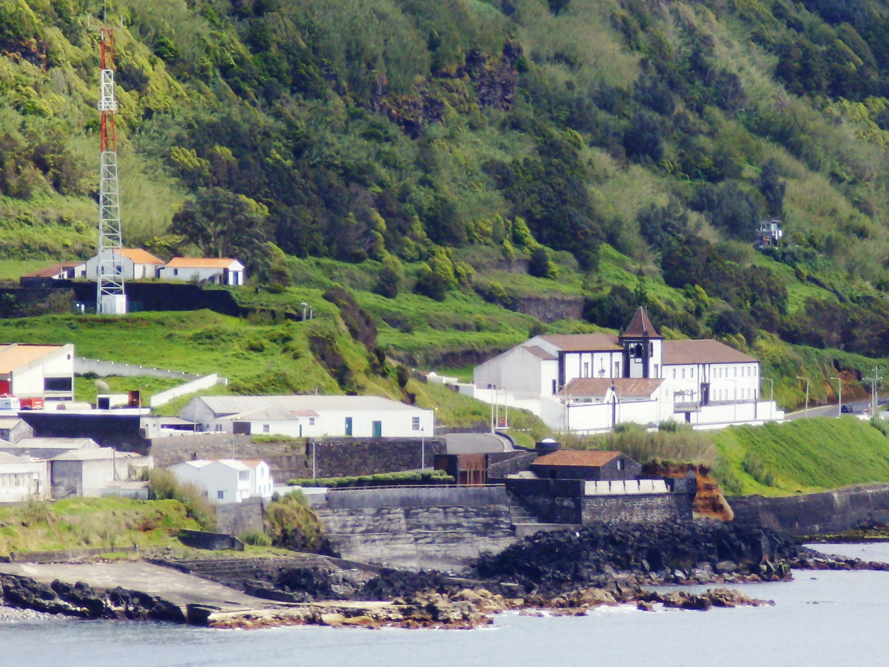 Forte de Santa Catarina, Lajes do Pico, ilha do Pico, Açores; ao fundo o Convento de São Francisco.